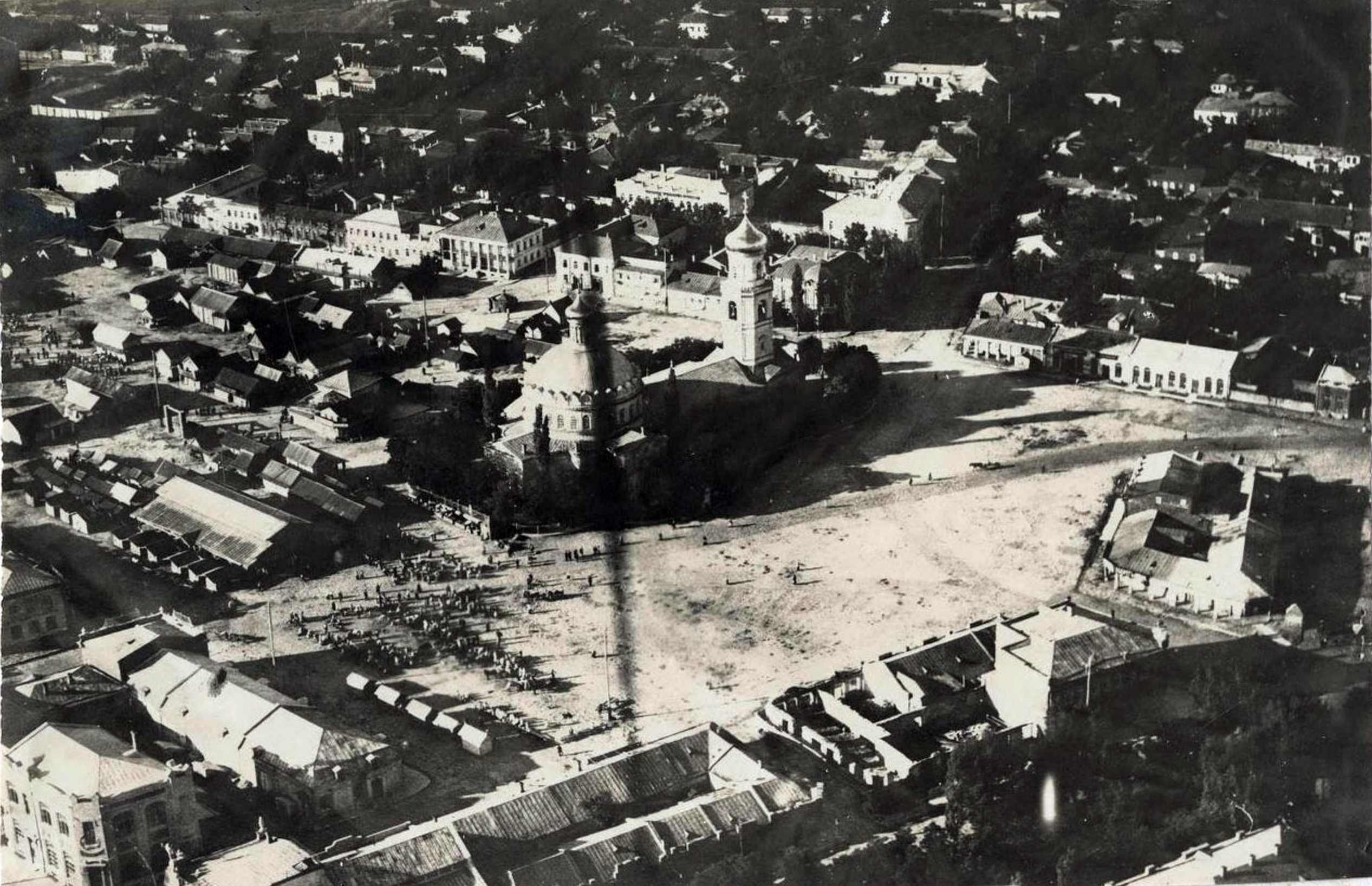 Вид на Соборную площадь, Таганрог, 1918. Аэрофотосъемка, период немецкой оккупации Таганрога.